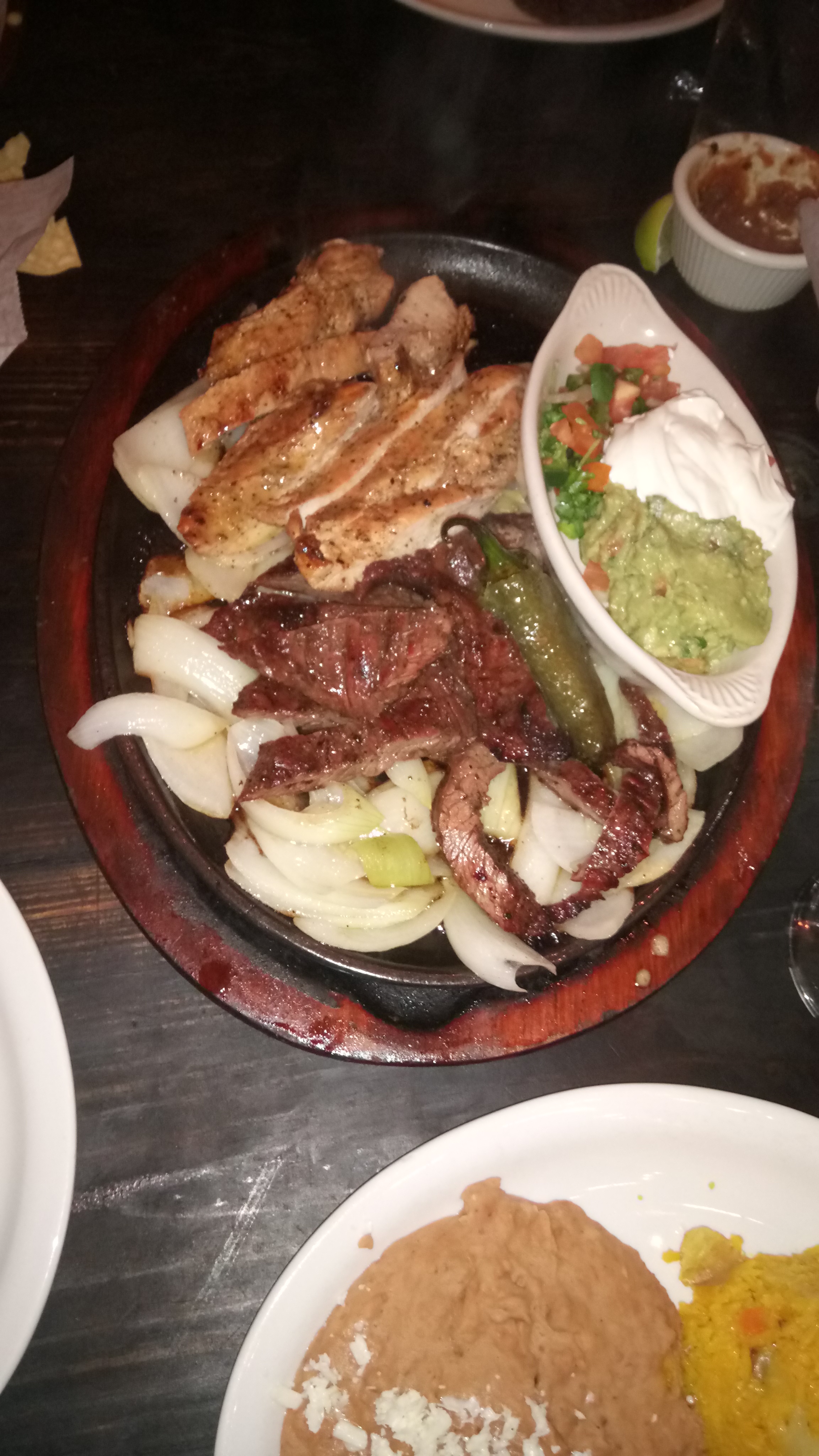 Ninfa's fajita dish